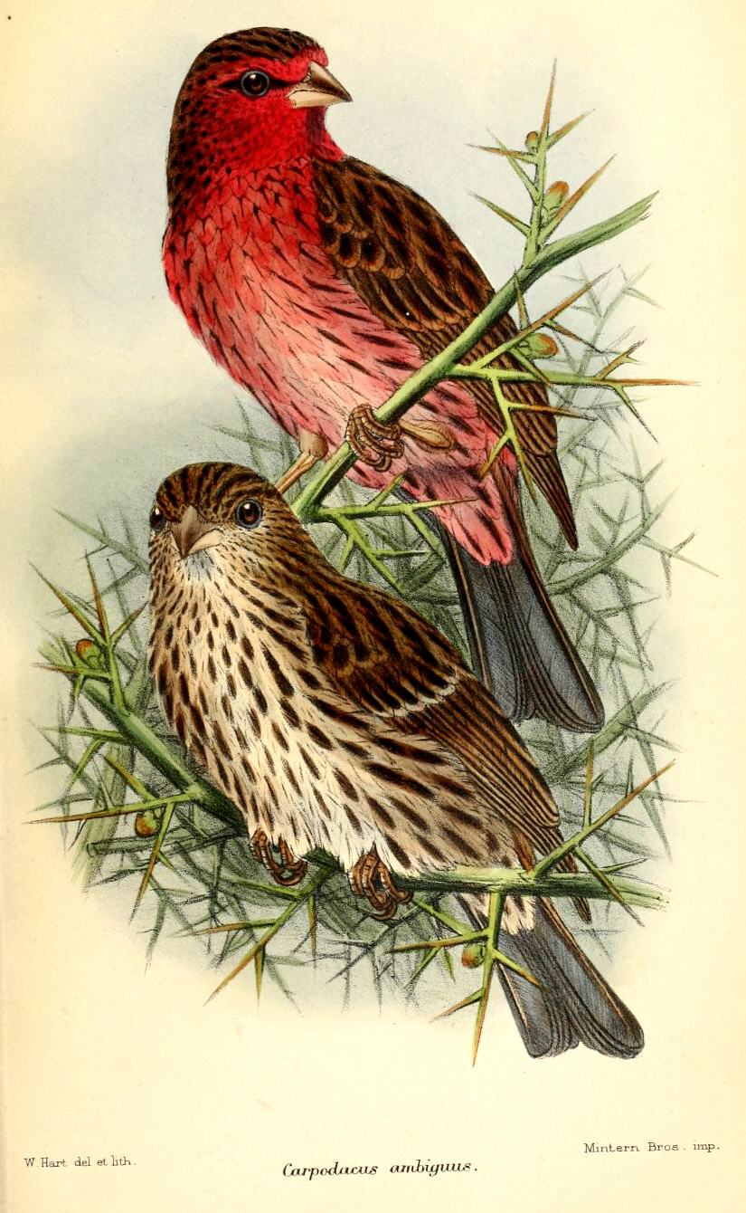 Carpodacus ambiguus = Carpodacus pulcherrimus, Beautiful Rosefinch